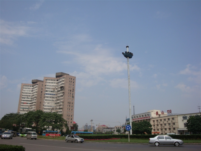 中文（中国大陆）: 河北省唐山市